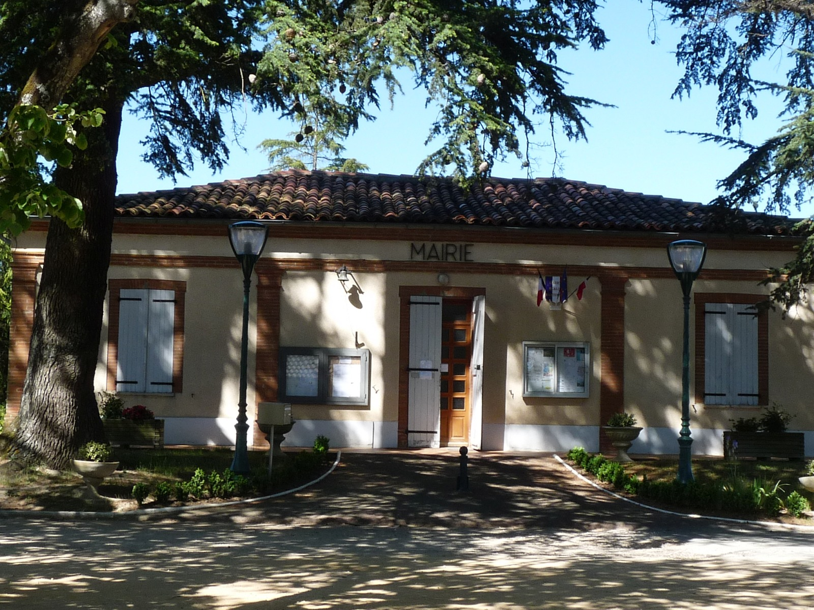 Mairie de Gauré, Haute-Garonne, France